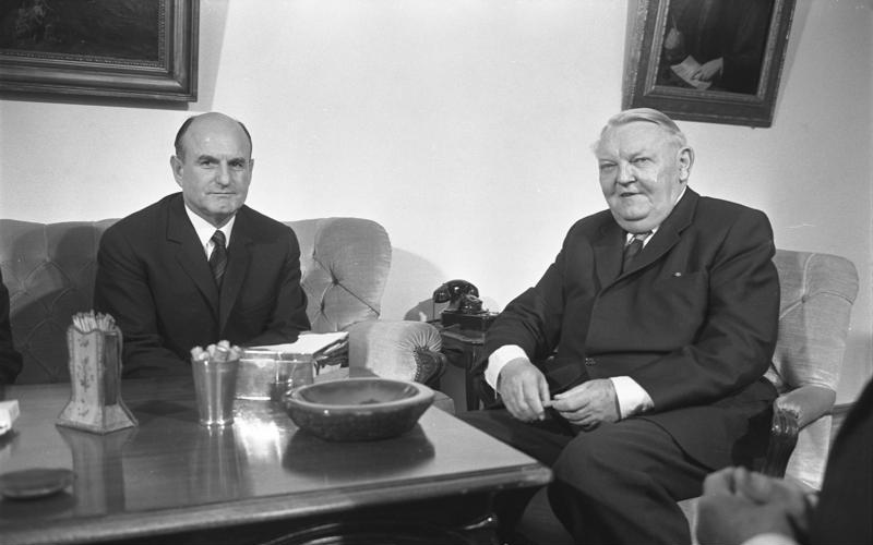 Bundeskanzler Klaus (Österreich) bei Bundeskanzler Erhard